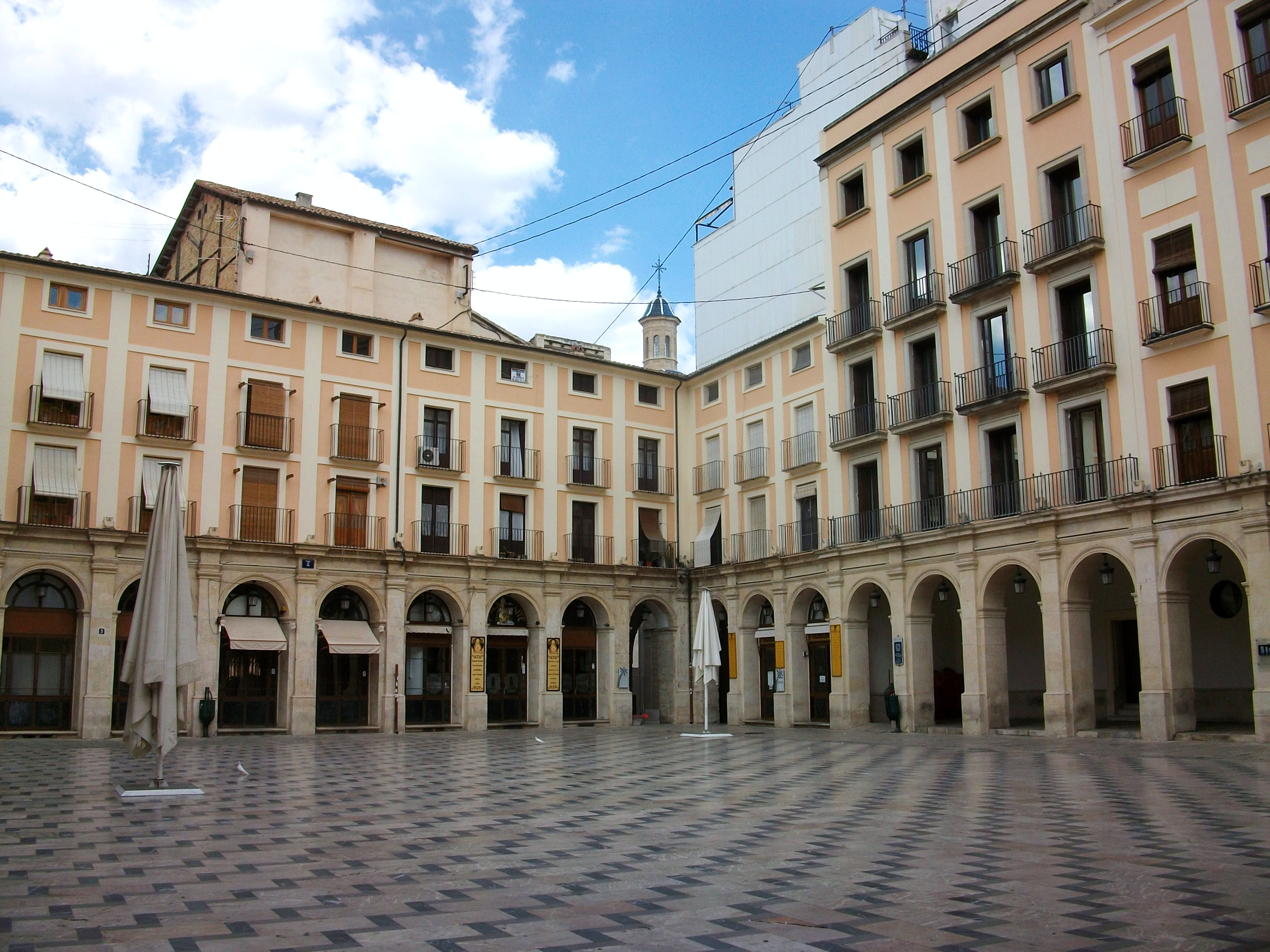 Plaça de Dins d'Alcoi